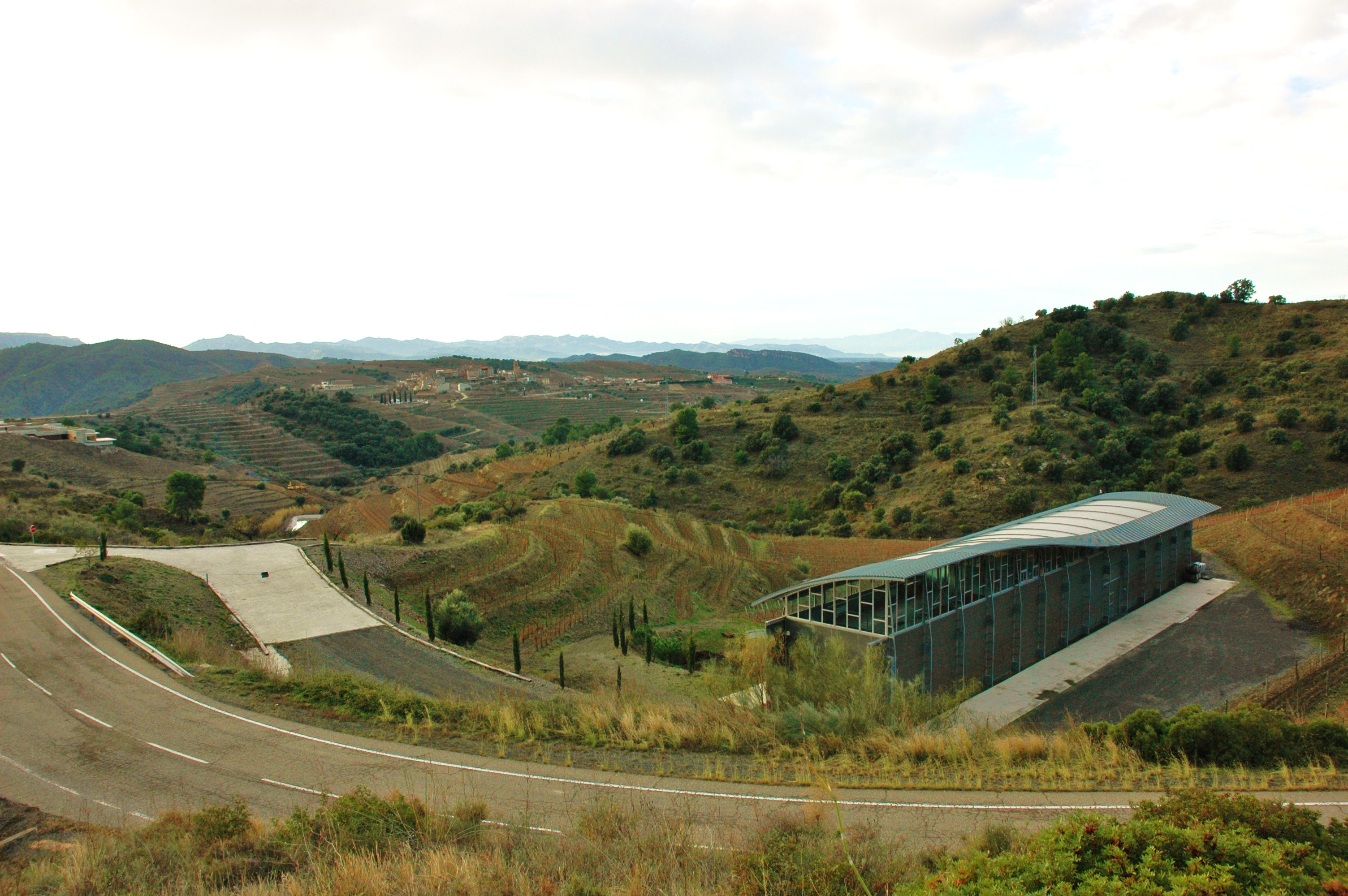 Gratallops - Celler Álvaro Palacios